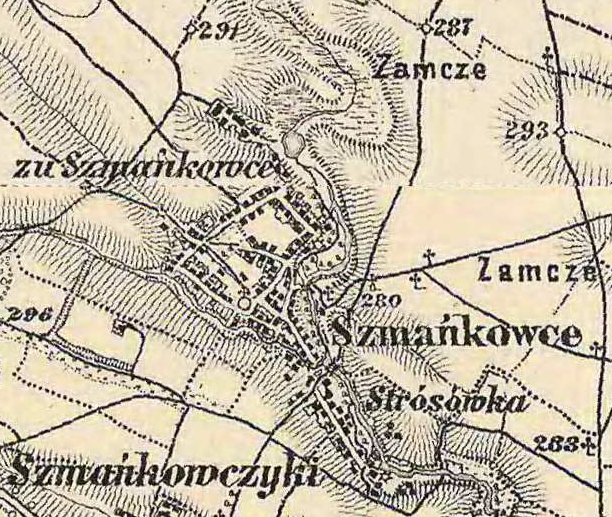 XIX ст.